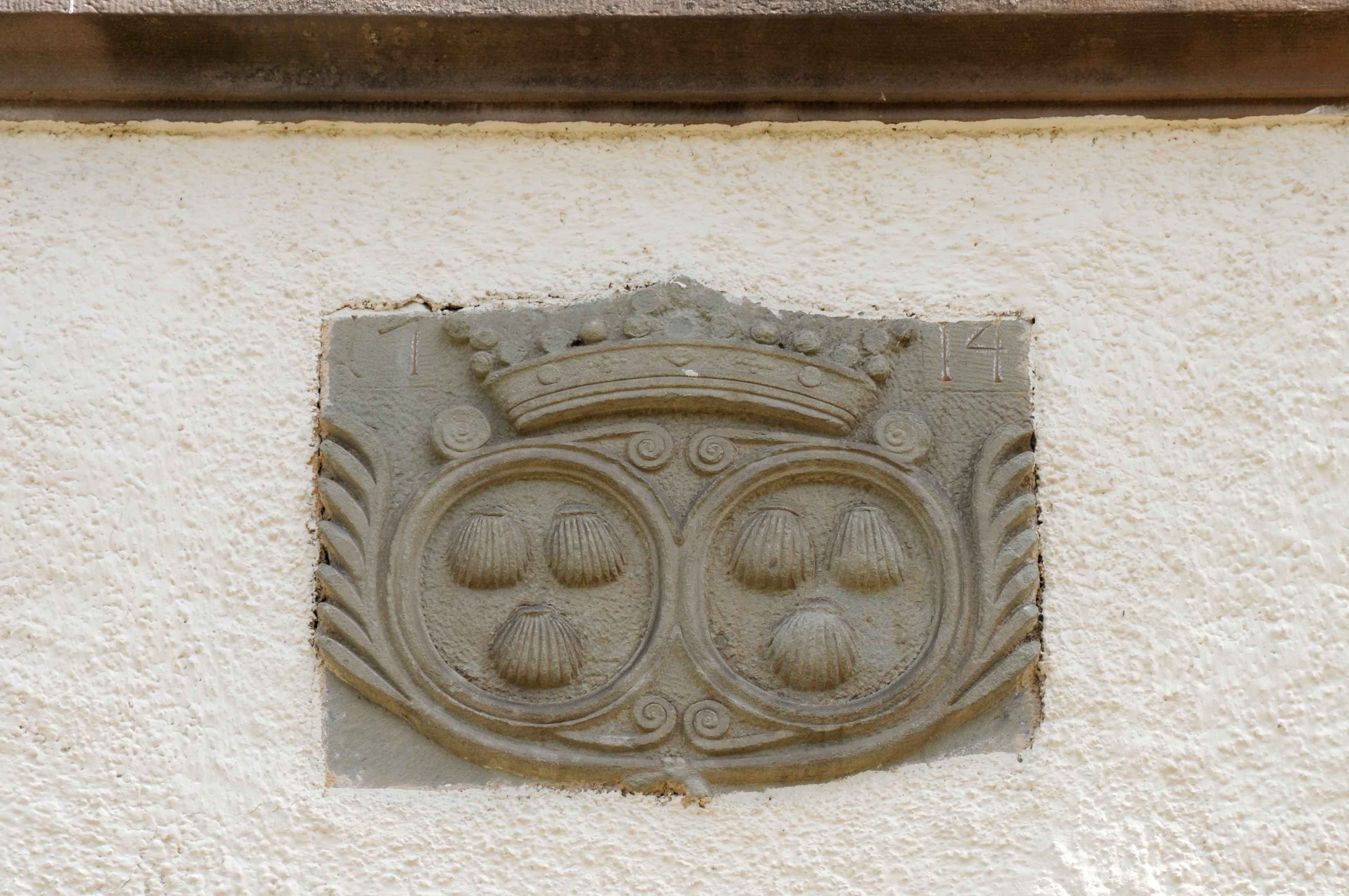 Buerschtermillen: Un der Fass vun der fréierer Millen de Wope vum Haus Metternich (Buerschter Linn) mat der Joereszuel 1714.